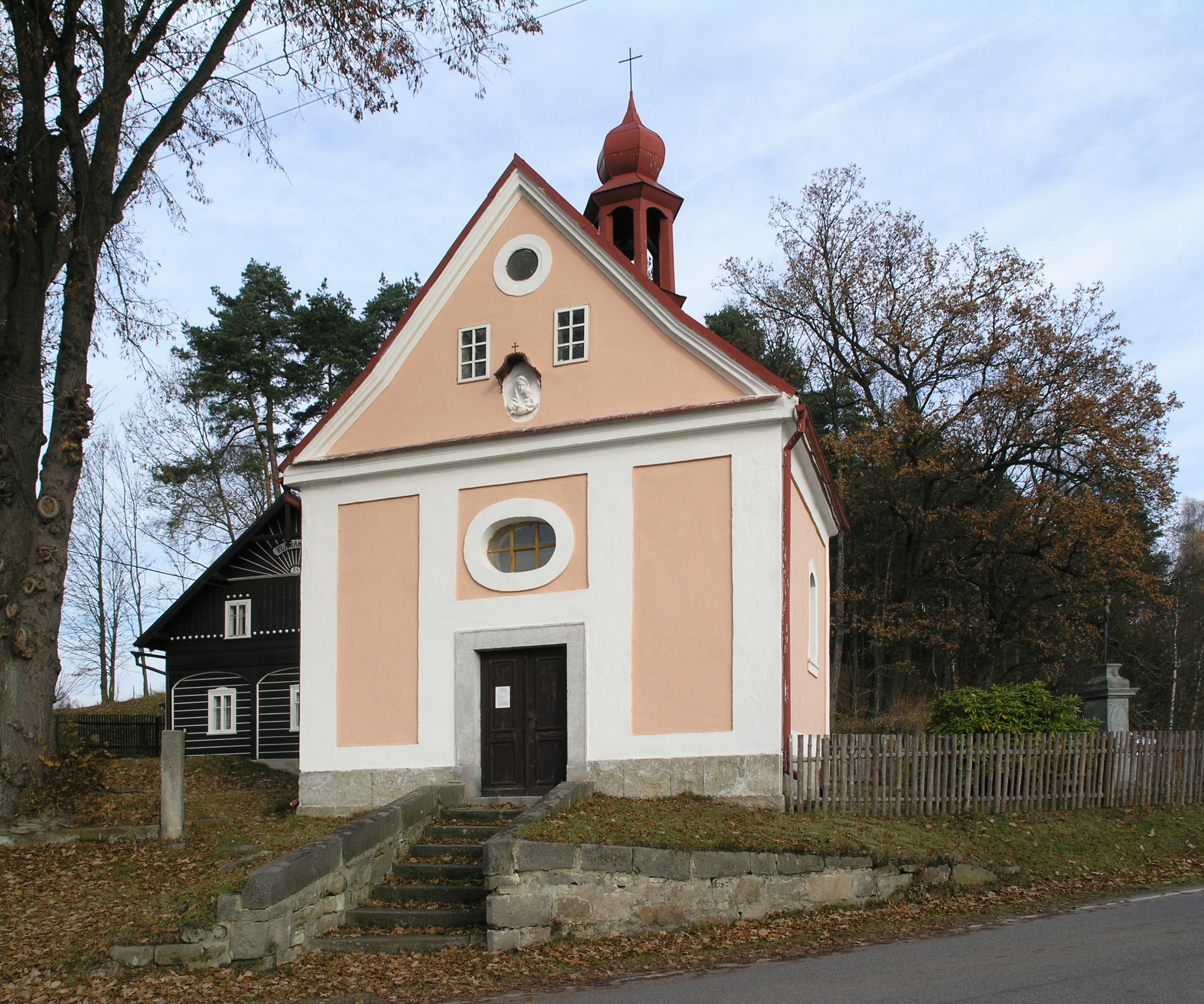 Trávník (Cvikov)